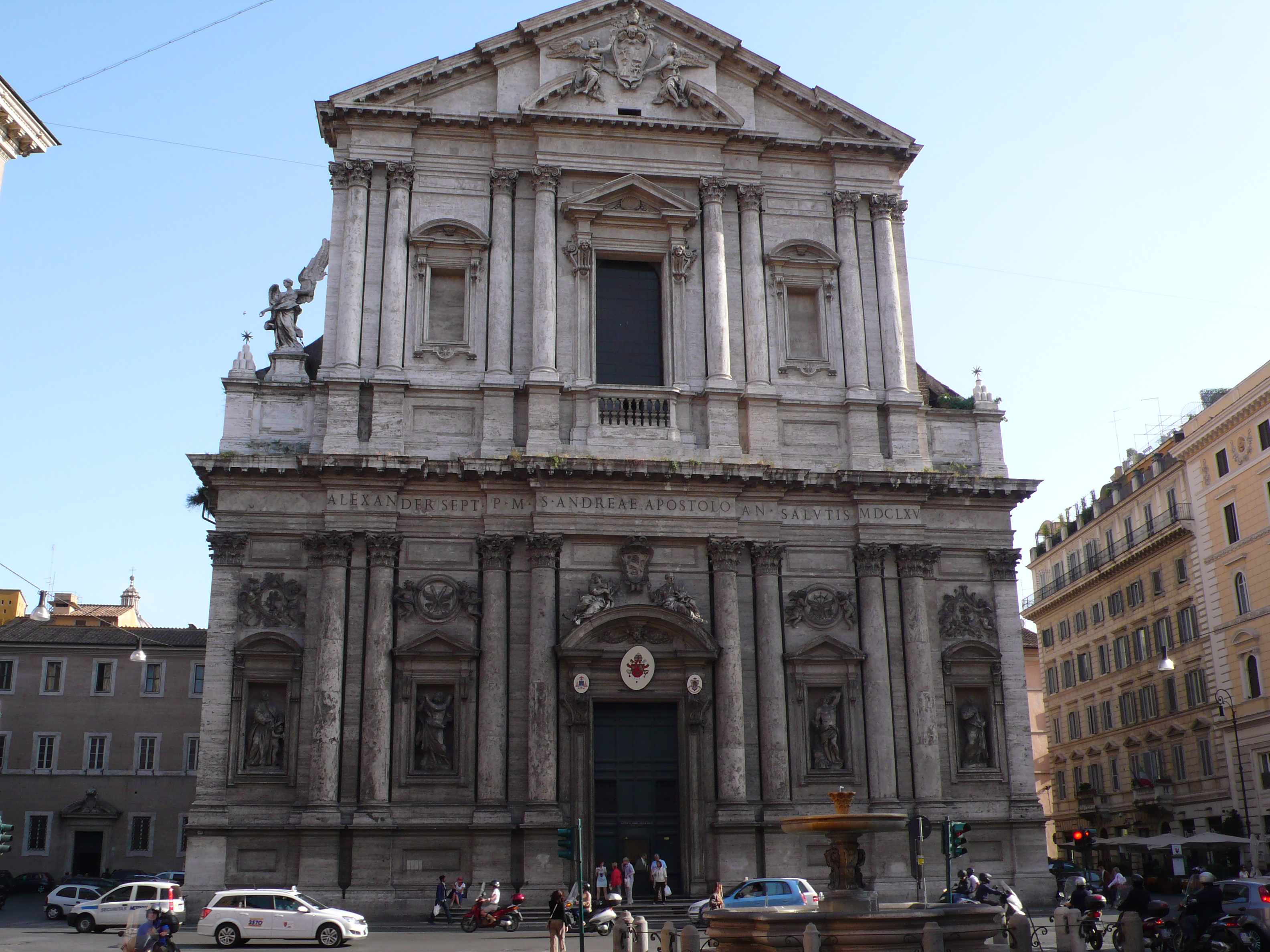 Sant’Andrea della Valle, Rom, erbaut im 16. Jahrhundert. Sie ist die Mutterkirche des Theatinerordens und Titelkirche der römisch-katholischen Kirche. Nach dem Petersdom hat sie die zweitgrößte Vierungskuppel, nach dem Pantheon die drittgrößte Kuppel in Rom überhaupt.